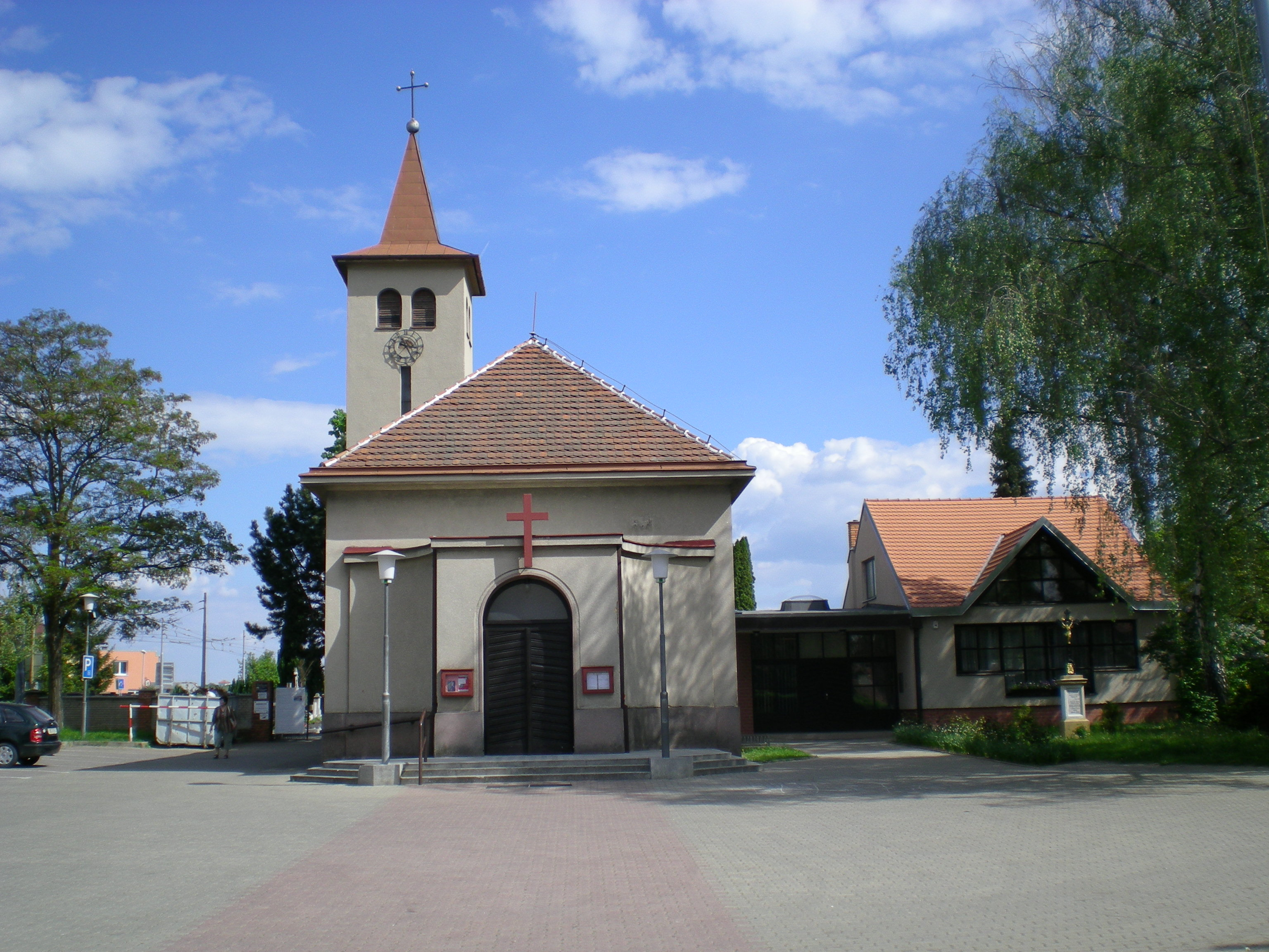 Brno-Slatina - kostel Povýšení svatého Kříže